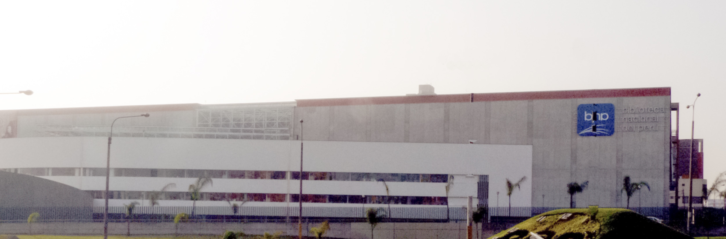 Biblioteca nacional del Peru (Lima)